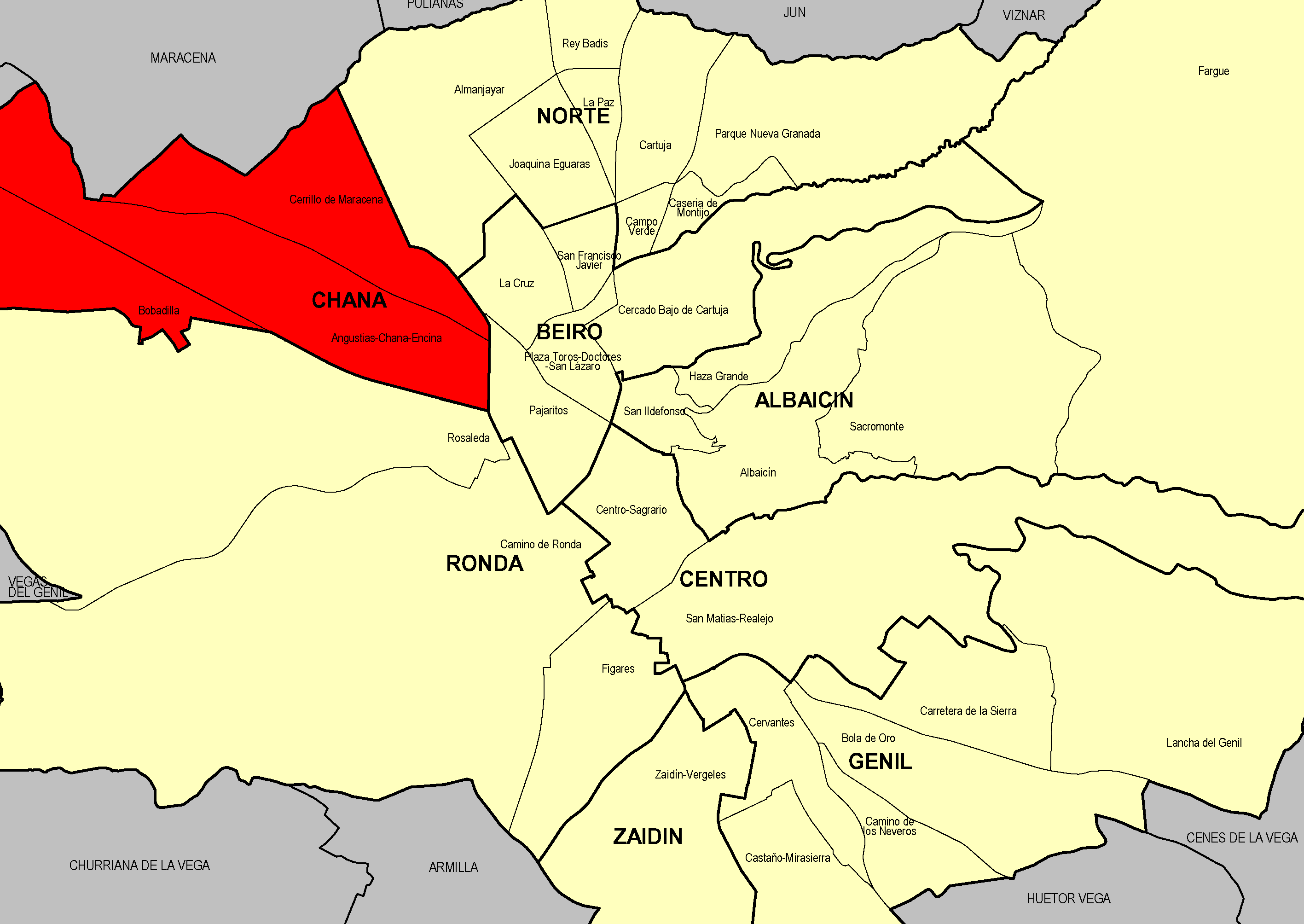 Distrito Chana, en el municipio de Granada (Granada, España)